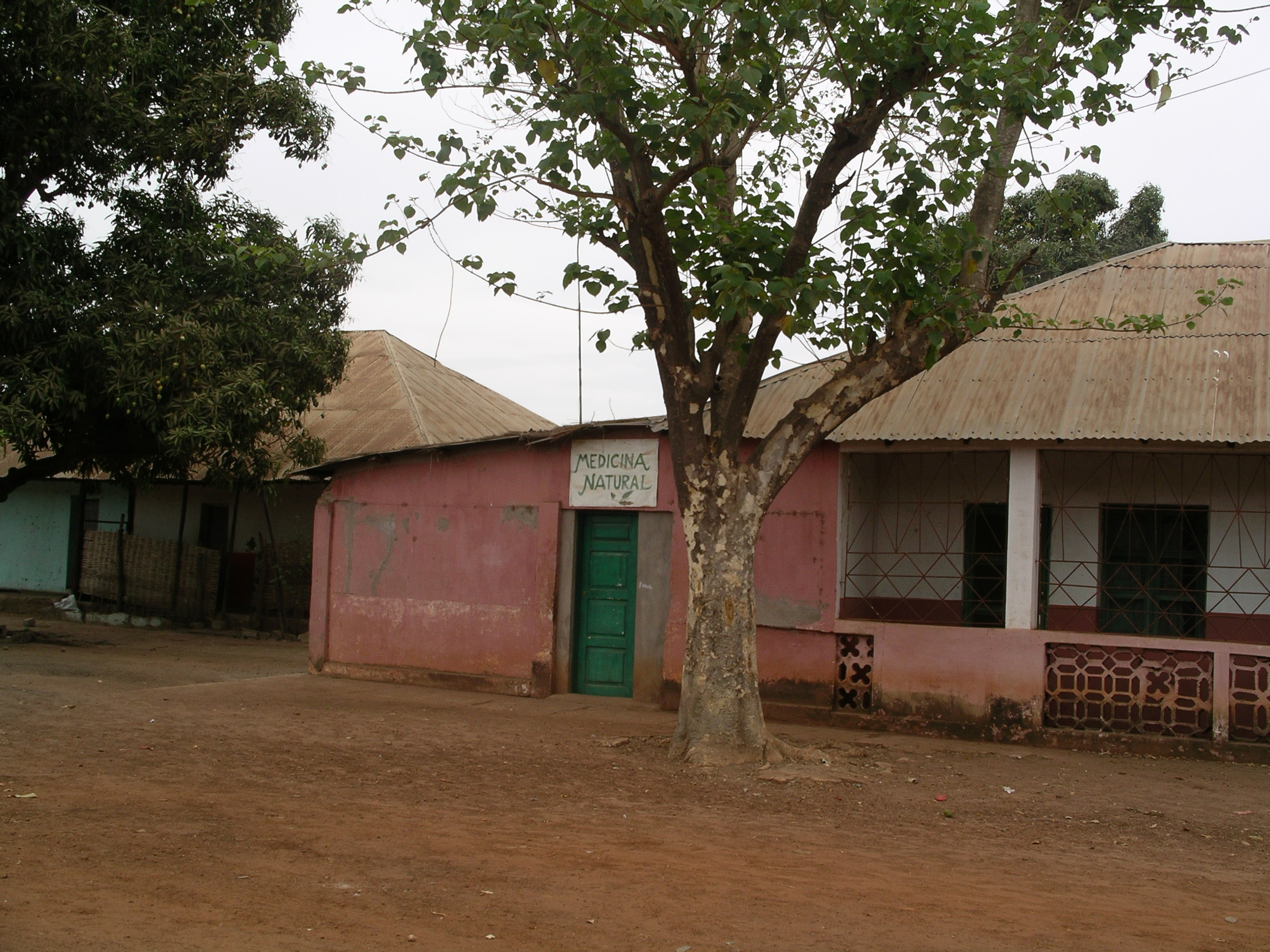 Mansoa Village